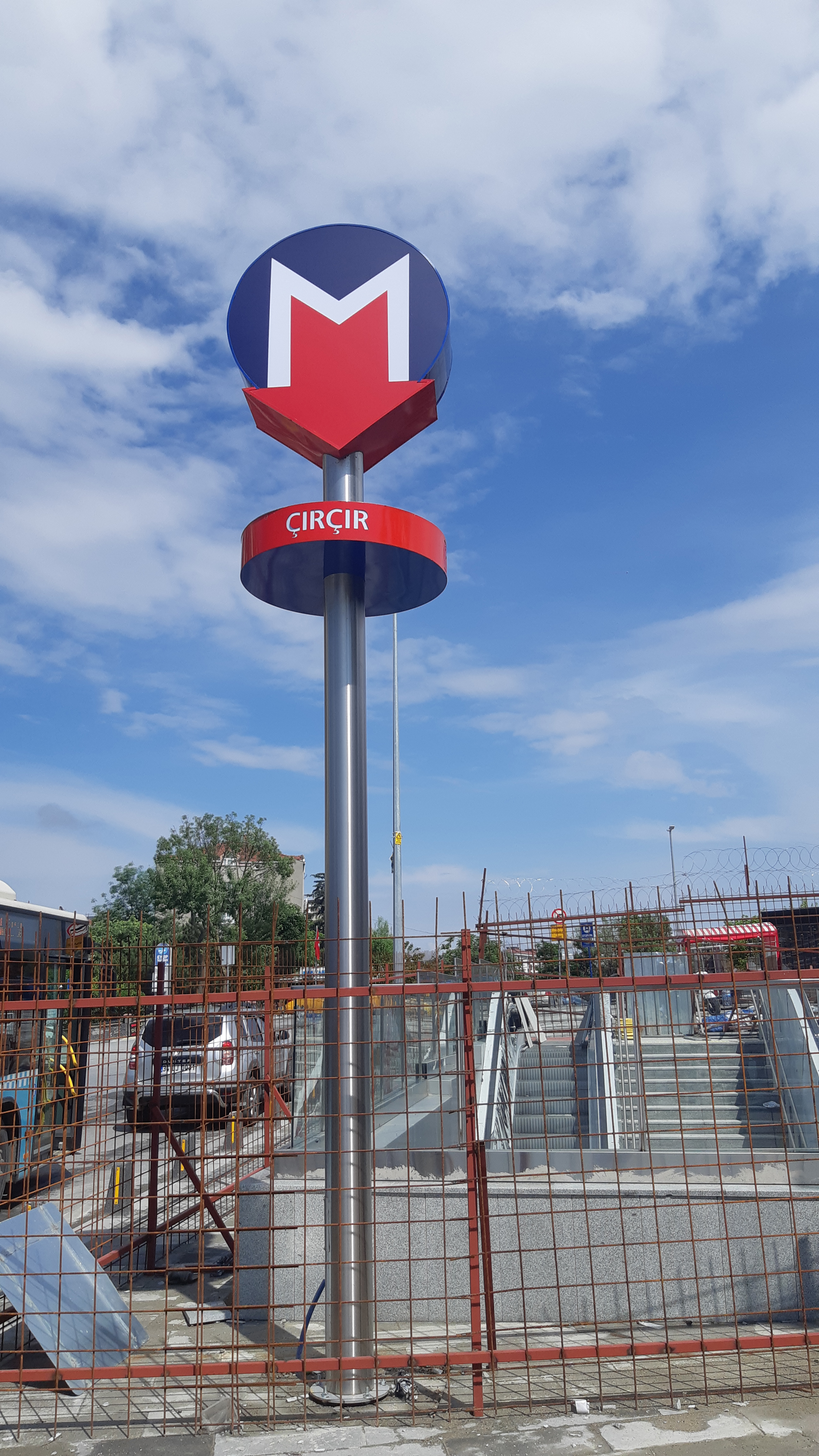 M7 İstanbul metrosu Çırçır durağı